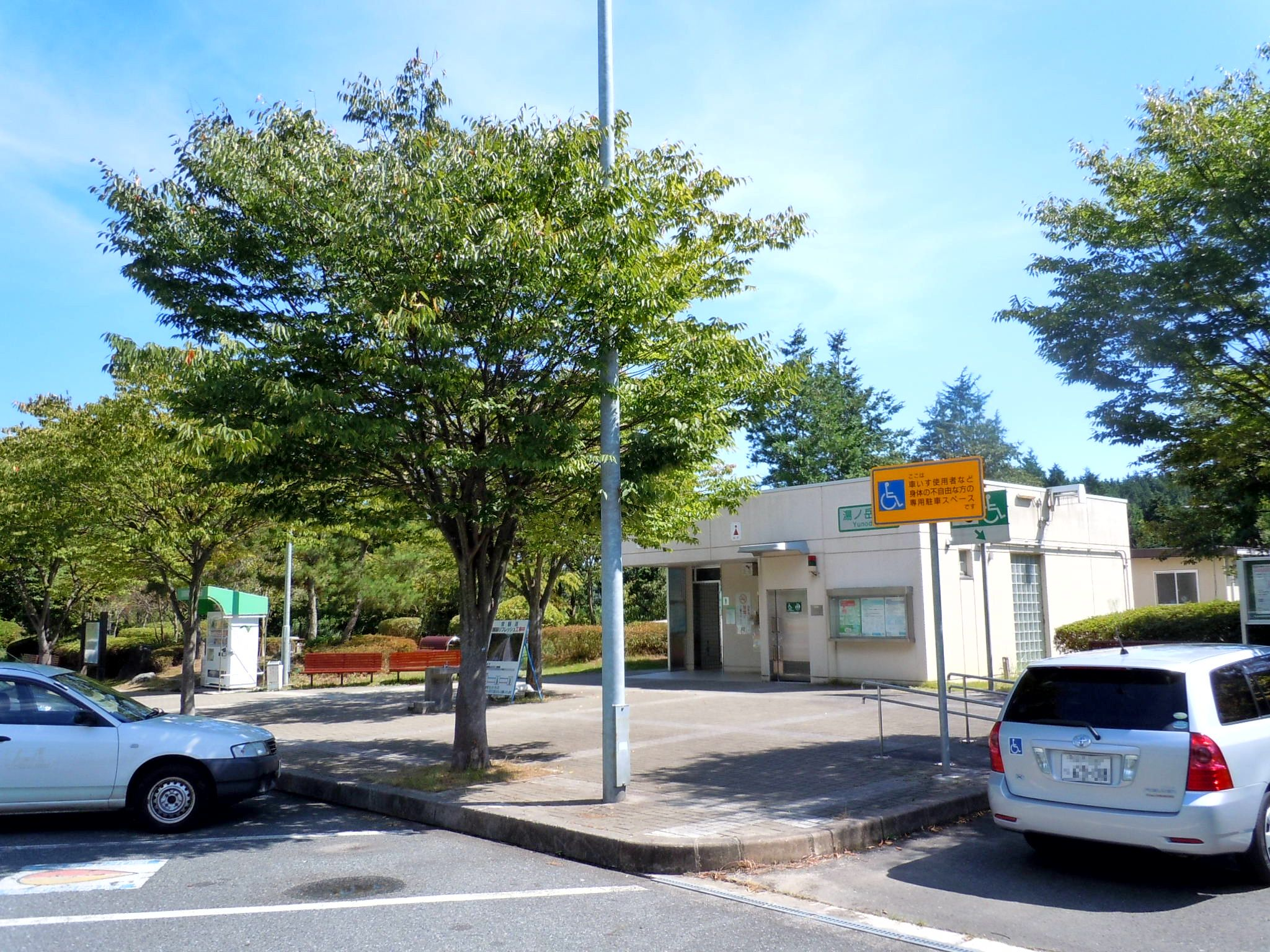 常磐自動車道 湯ノ岳パーキングエリア（上り線）